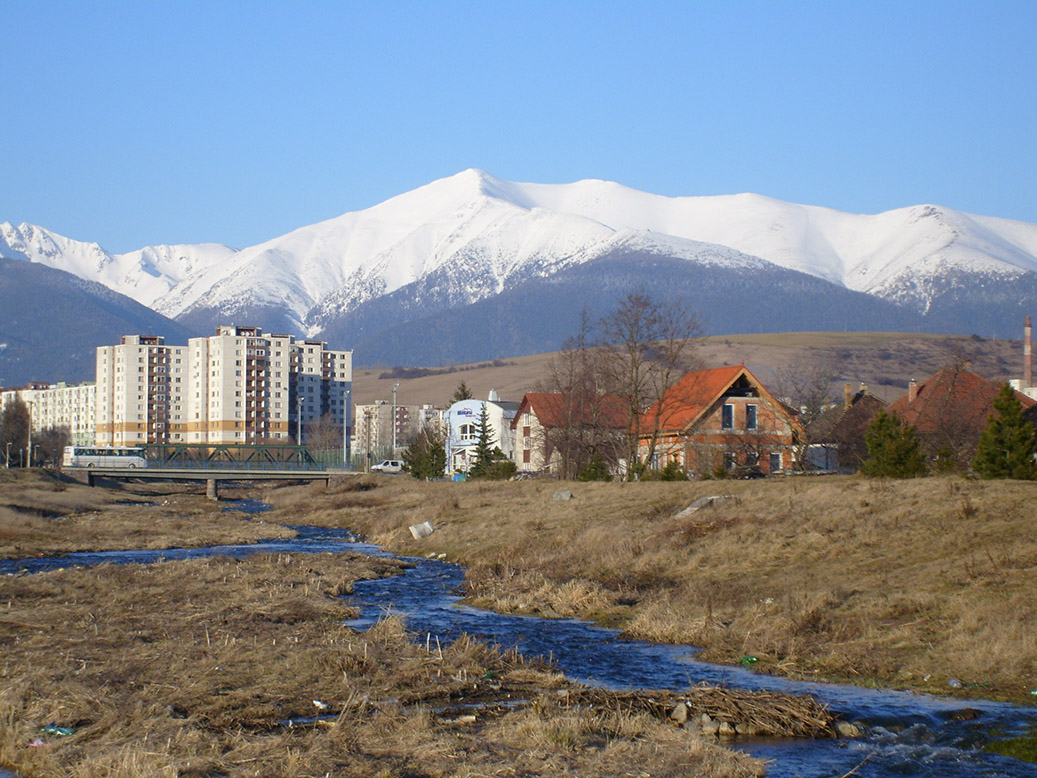 Pohľad na sídlisko z Okoličného